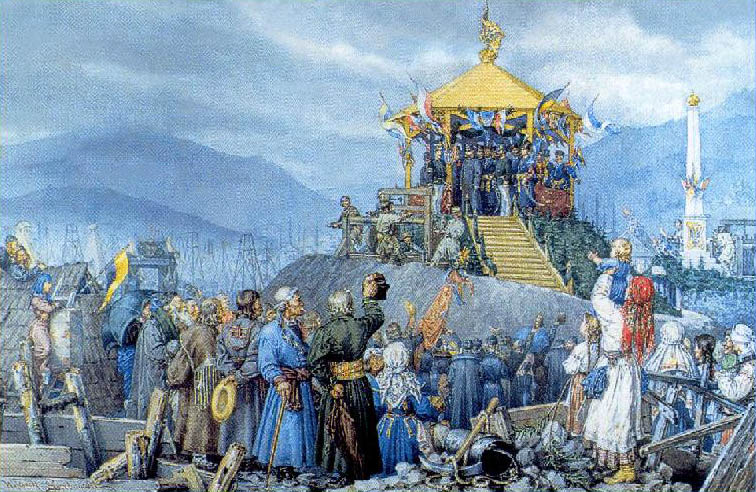 Войцех Грабовський. Візит імператора Франца Йосифа I до Борислава 13 вересня 1880 р. Акварель.